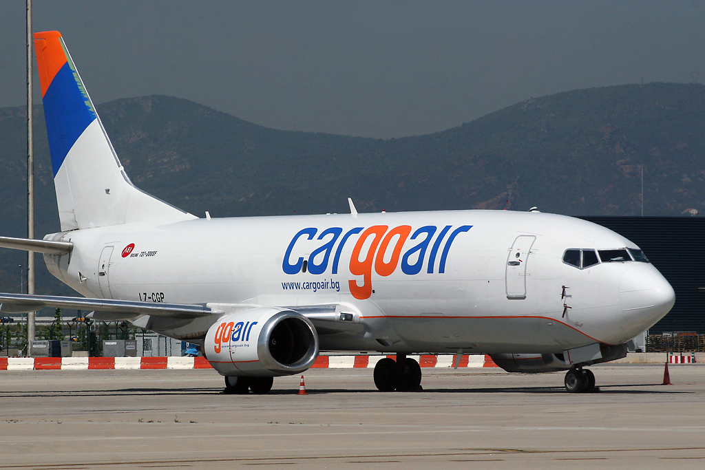 Cargo air Boeing 737-35B(F)